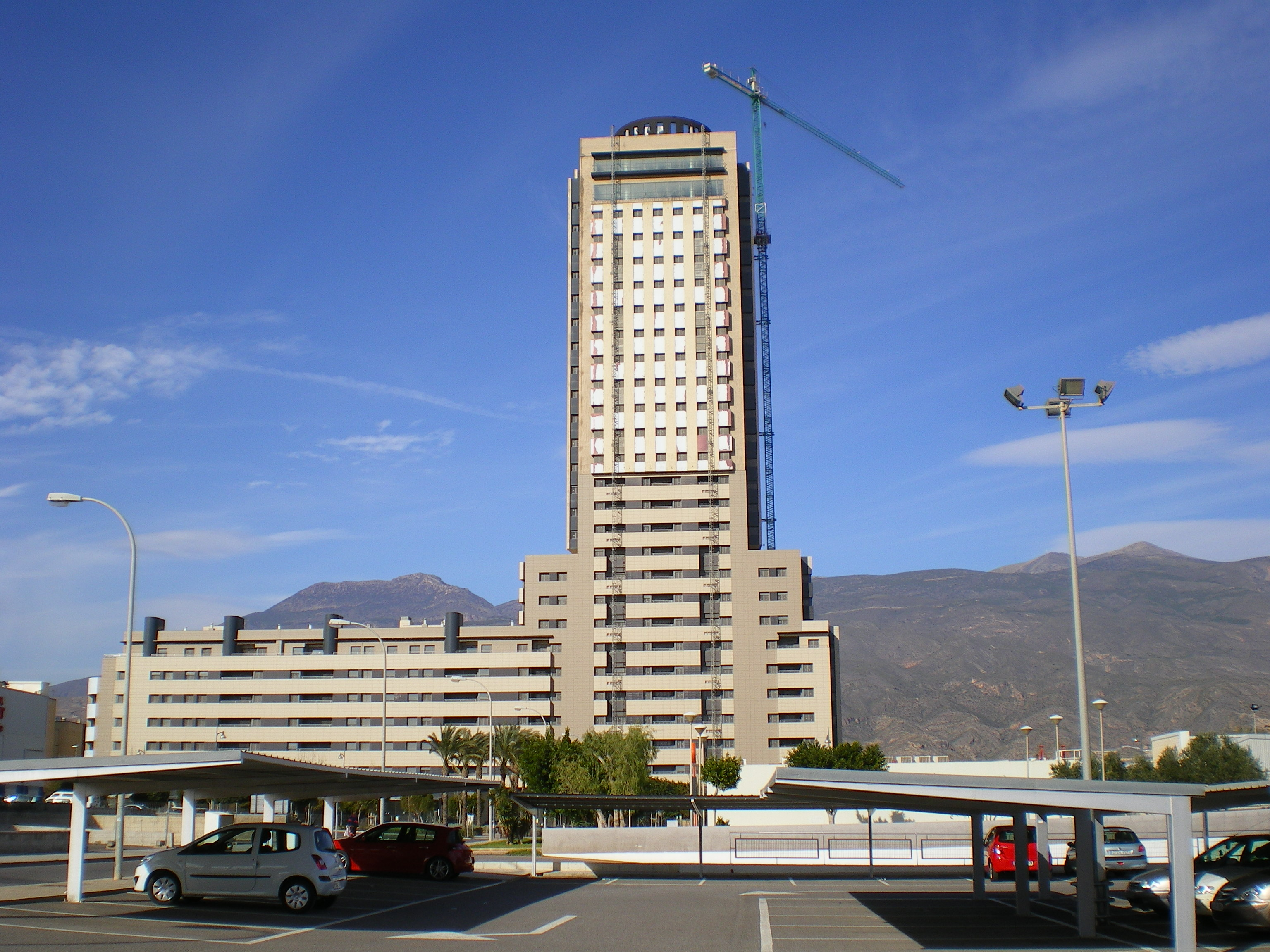 Fotografía de la fachada sur del Edificio Torre Laguna en El Ejido, Almería, España.